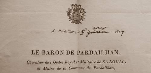 En-tête du maire de Pardailhan, baron Thomas de Treil de Pardailhan, chevalier de Saint-Louis